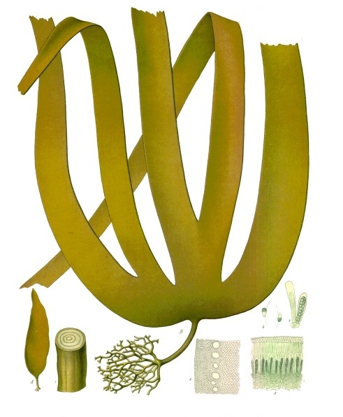 Palmentang. A junge, B alte Pflanze, verkleinert; 1 Stück des Stieles mit Querschnitt, nat. Gr.; 2 mikroskopischer Querschnitt aus dem äusseren Theile des Stieles, mit den Schleimhöhlen, vergrössert; 3 Sporenschläuche, desgl.; 4 Sporenschlauch mit Paraphyse, desgl.; 5 Schwärmsporen, desgl. Die Figuren 3, 4, 5 gehören der L. saccharina Lam. an.